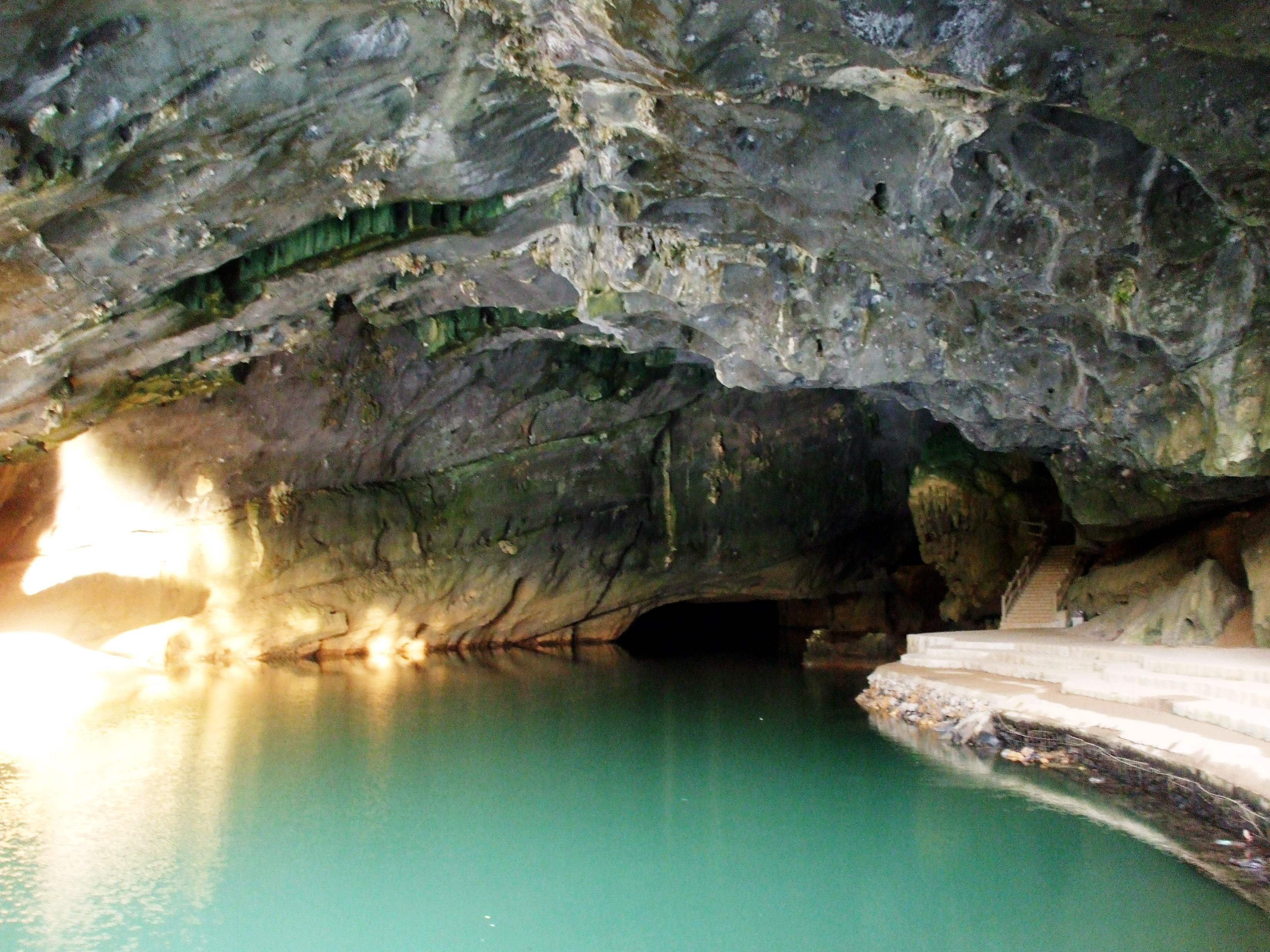 Sông Son chảy trong động Phong Nha, thuộc huyện Bố Trạch, Quảng Bình, Việt Nam.